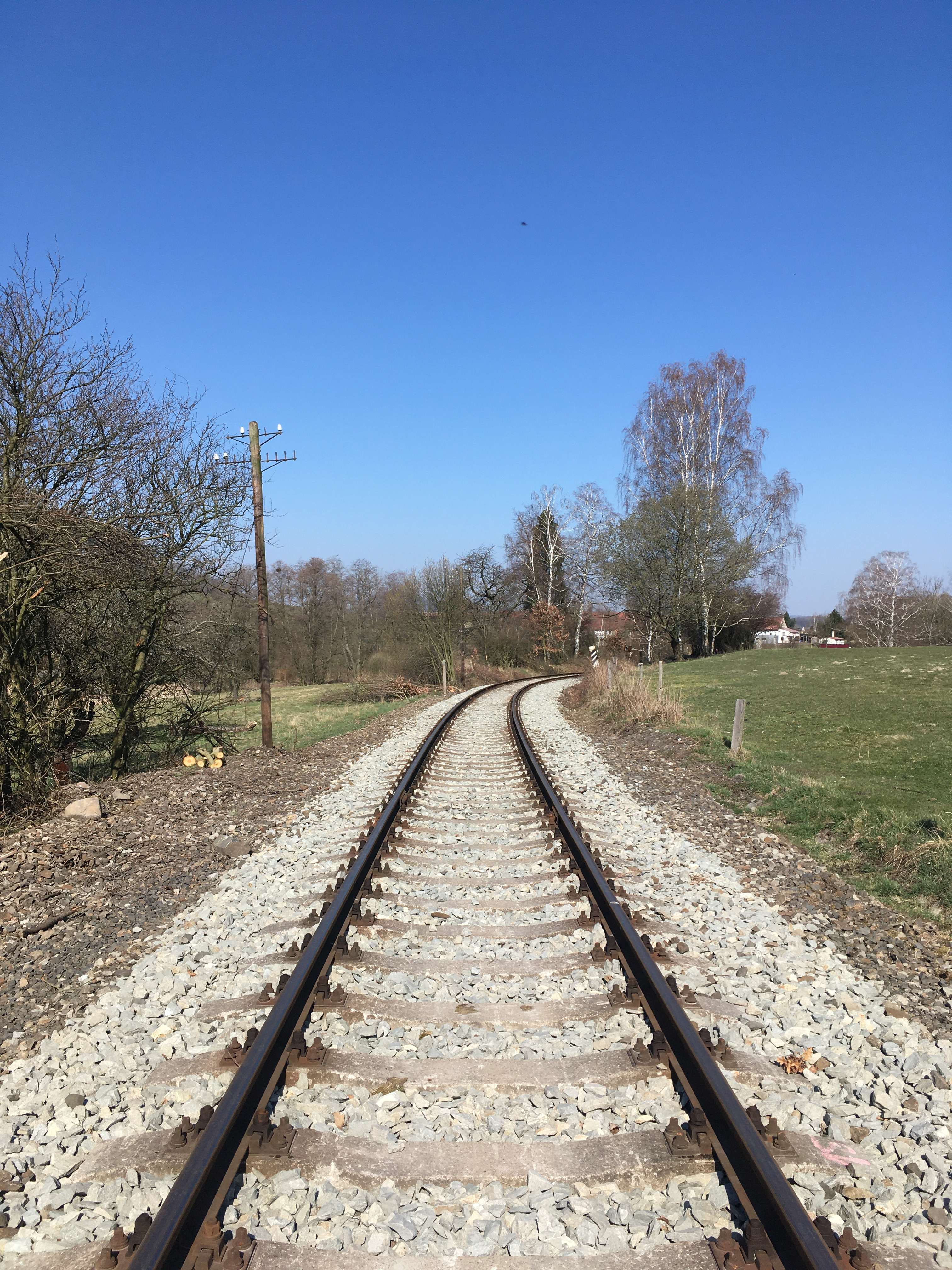 Pohled na trať Česká Kamenice - Kamenický Šenov na jaře 2020